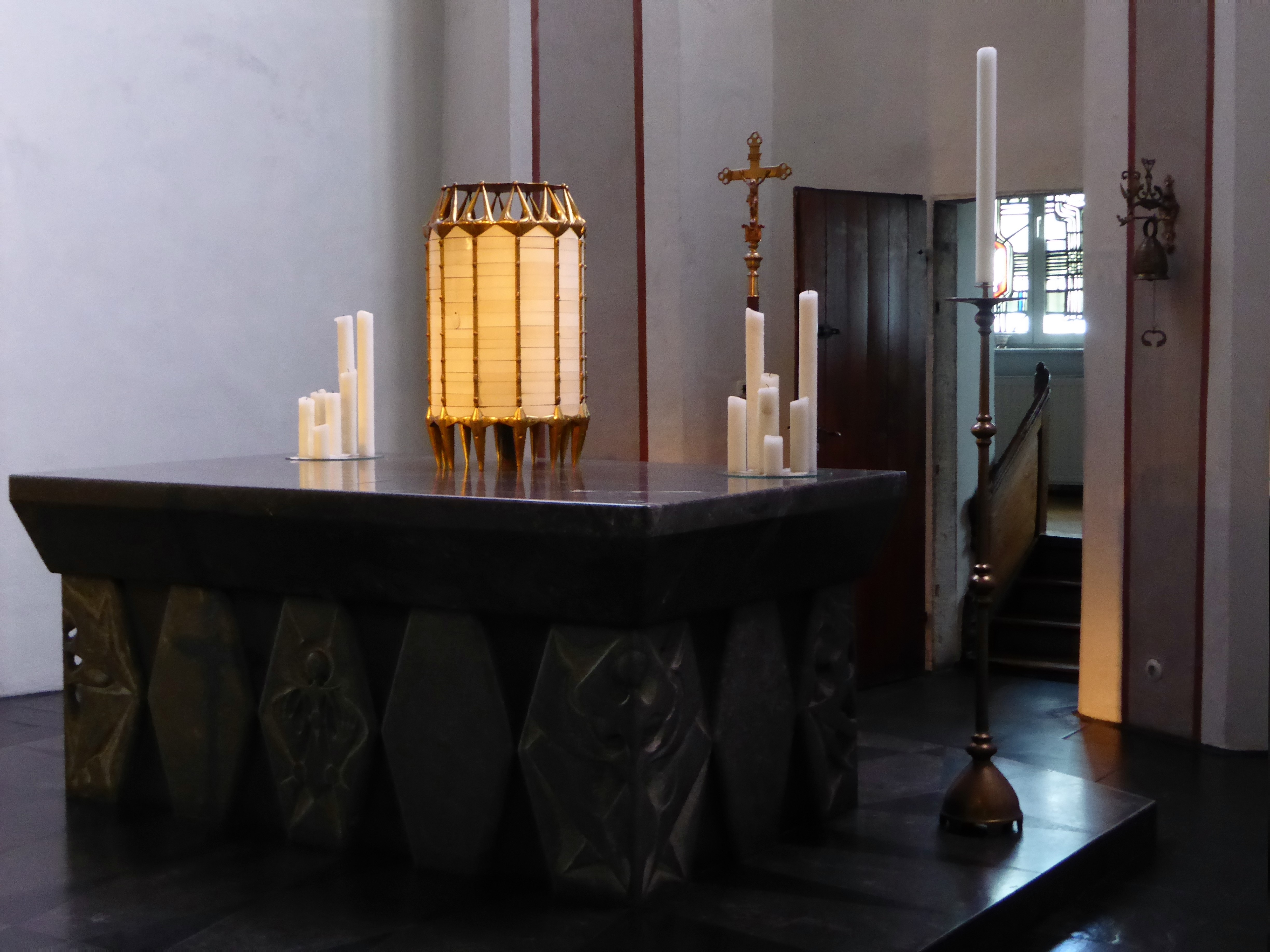 Altar und offene Tür zur Sakristei in St. Maria Lyskirchen